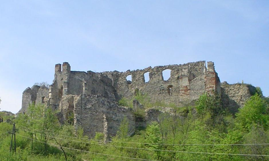 Ružica grad